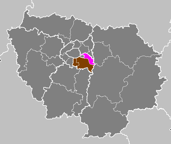 Maps of arrondissements and cantons of France: Département du Val-de-Marne - Arrondissement de Nogent-sur-Marne.PNG (Région Île-de-France)